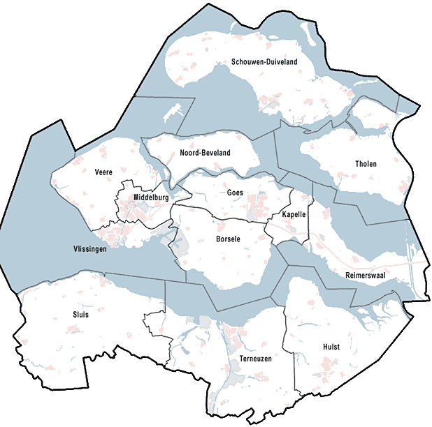 Provincie Zeeland, met indeling van gemeenten (2010). Door Jan-Willem van Aalst, samengesteld uit publiek beschikbare geo-data: Referentie-ondergrond (kustlijn, steden, wegen) gerasterd uit de OpenStreet Map OSM. ( Inhoud is beschikbaar onder de Creative Commons Attribution-ShareAlike 3.0 license. Vectorgrenzen van gemeenten en regio's vrij ter beschikking gesteld met dank aan cartografen van brandweerregio's Hollands-Midden en IJsselland; gerasterd in Photoshop. Overige kenmerken op de kaart: eigen tekenwerk van Jan-Willem van Aalst, op basis van gerasterde gemeentegrenzen.